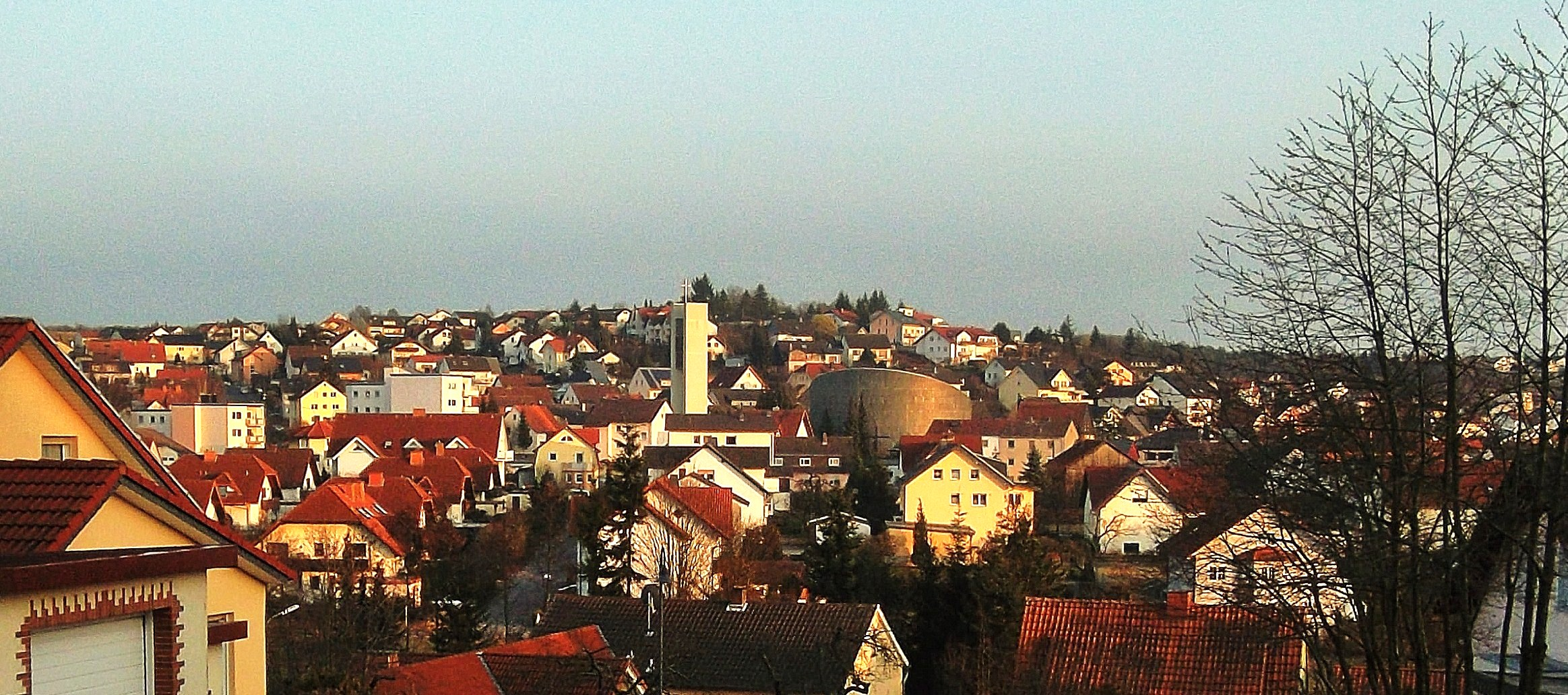 Ansicht Künzell Kernort mit Pfarrkirche St. Antonius